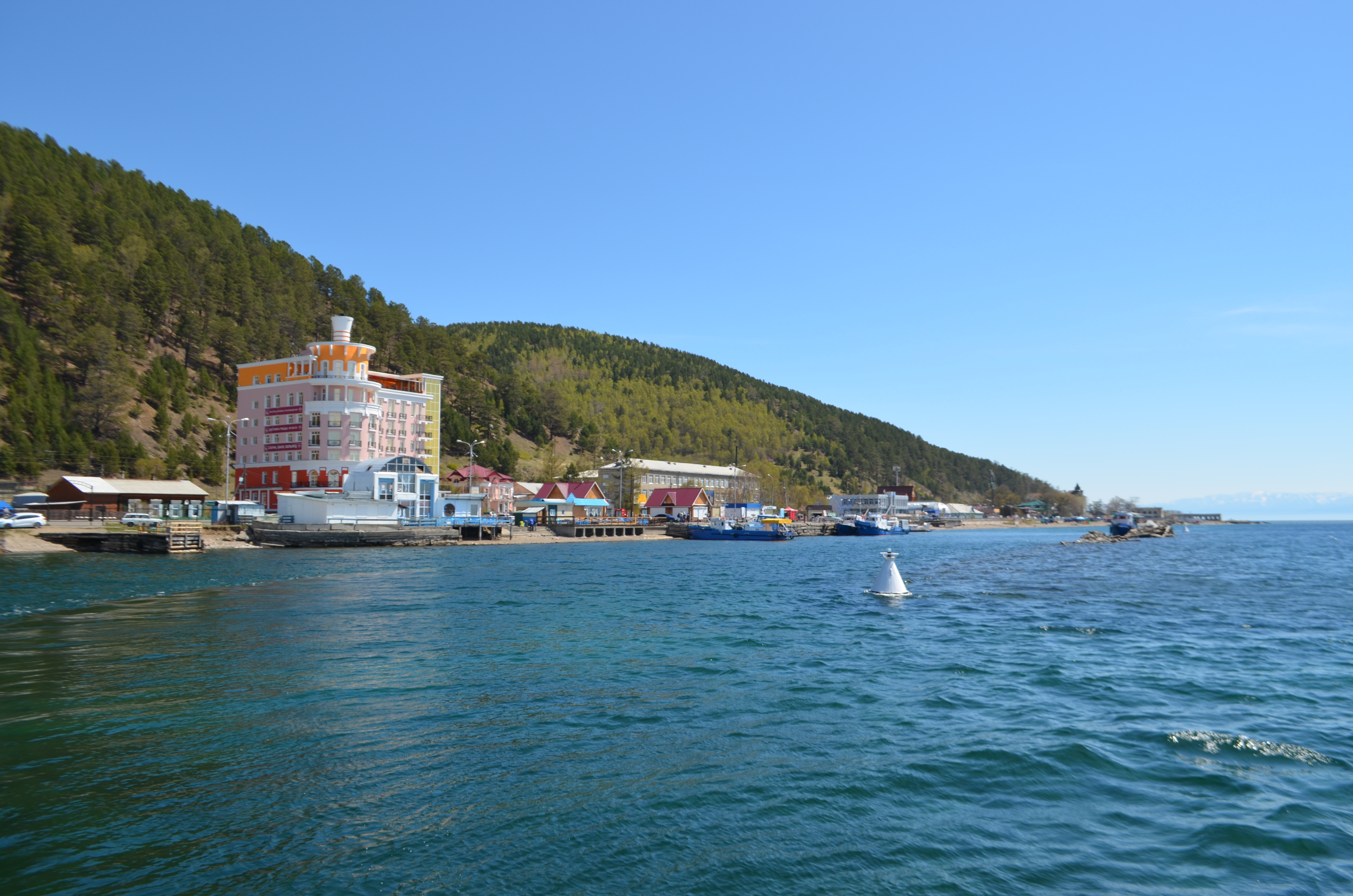 Листвянка, Иркутский район Вид на отель Маяк и школу со стороны озера Байкал This image is related to the protected area of Russia number 3810100